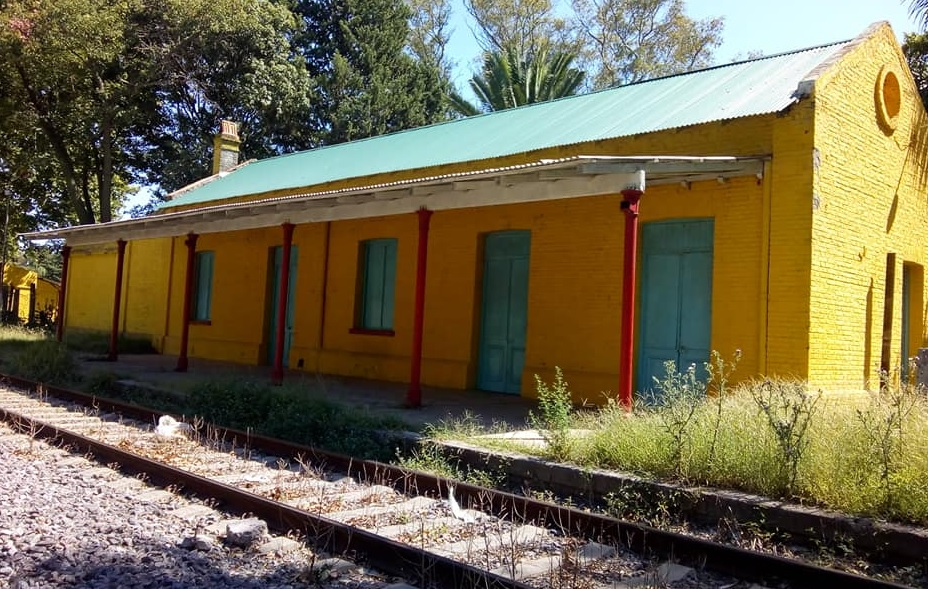 Estacion Theobald del Ferrocarril Bartolomé Mitre